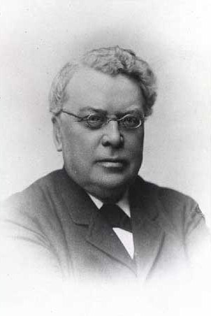 Peter Alexander Montagne Lillienskiold (1819-1891), Danish supreme court judge